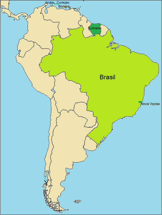 Português do Brasil: Localização dos crioulos luso-americanos